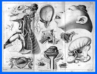 Podencéphale